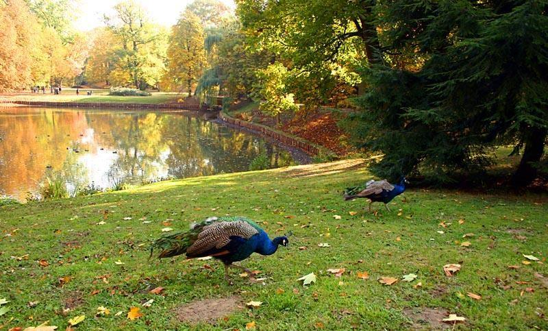 Warszawa (Polska)